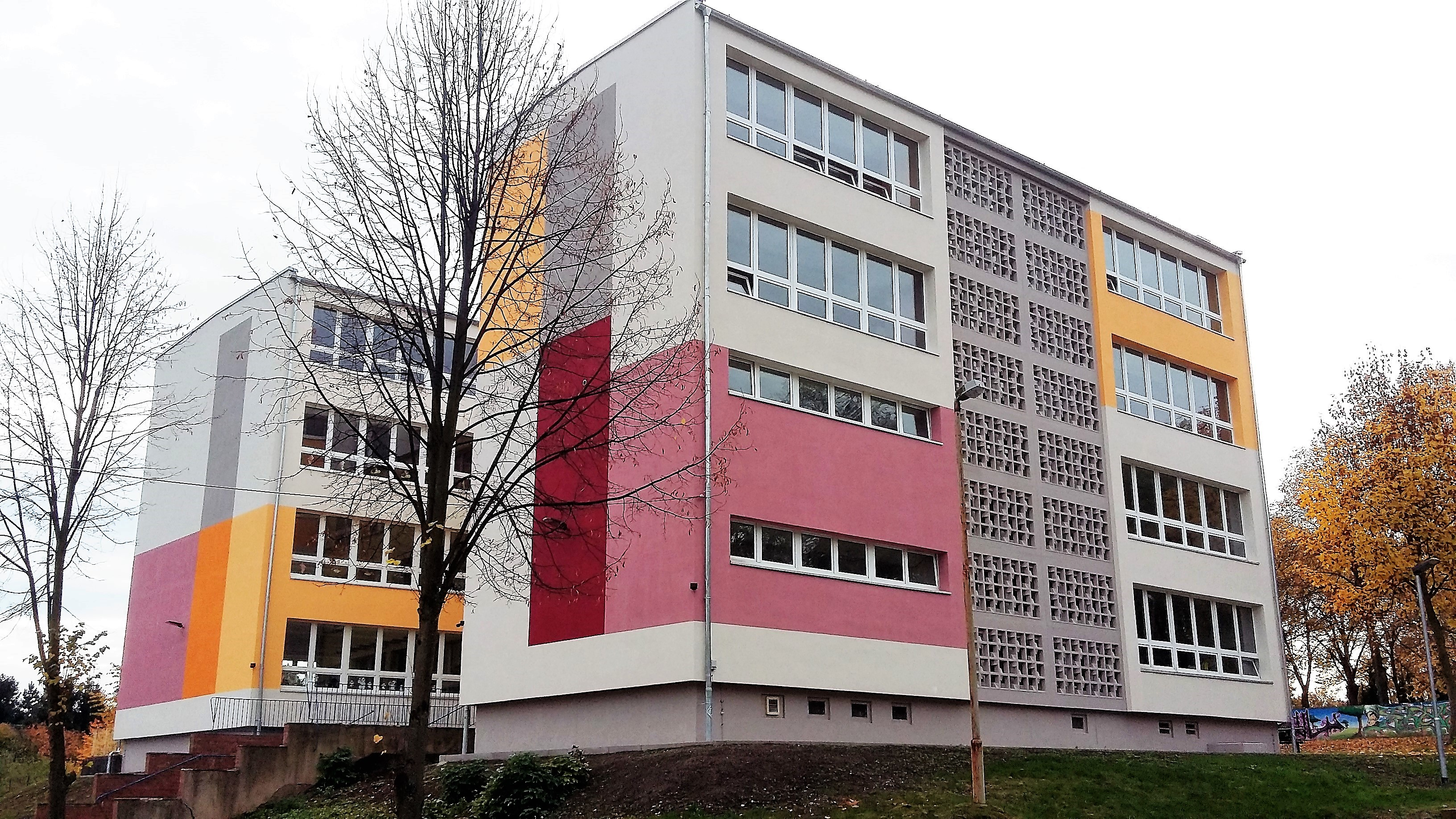 Neue Grundschule in Alsleben (Saale)